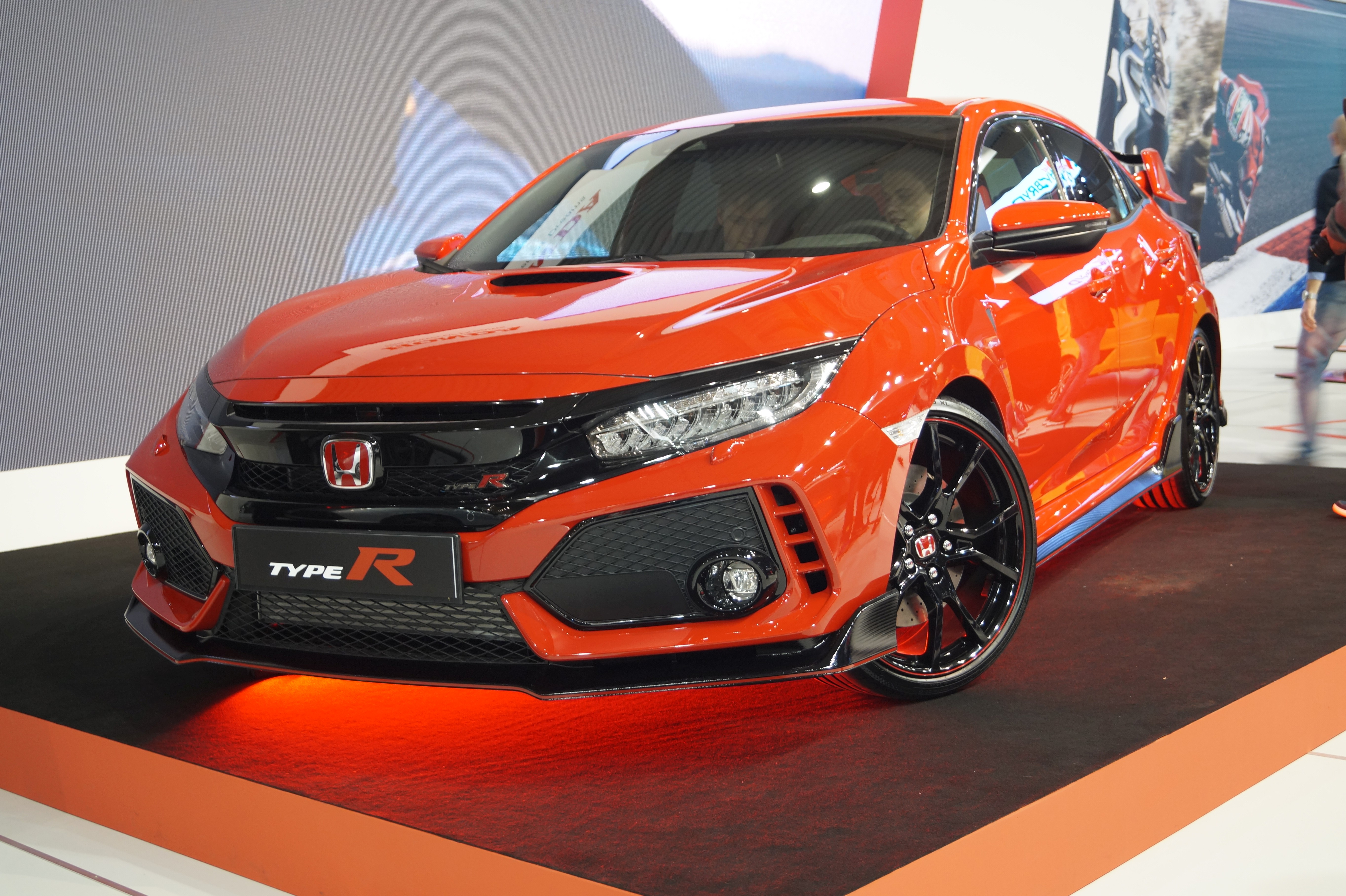 Honda Civic Type-R na Motor Show Poznań 2017.